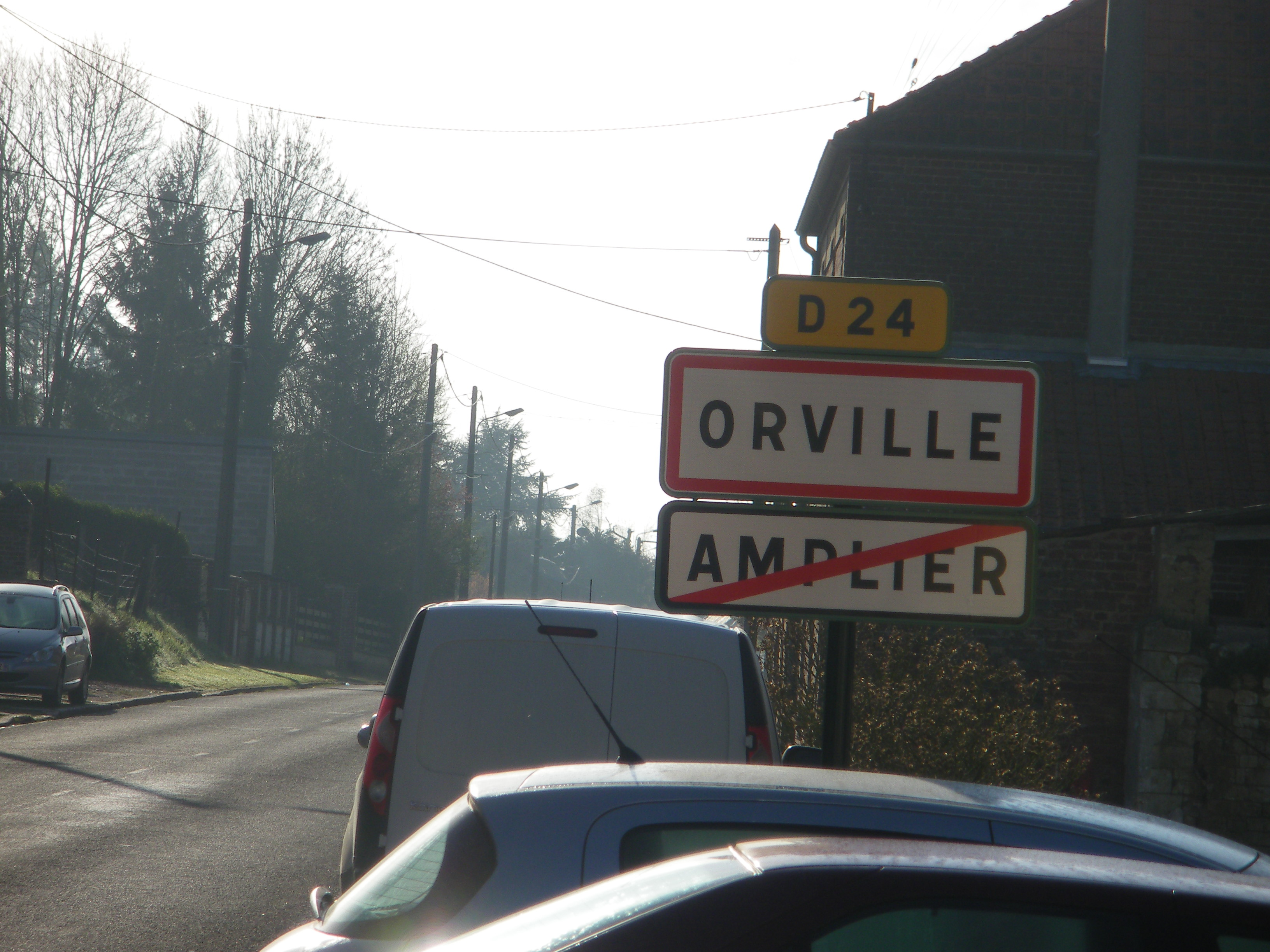 Une entrée de la commune d'Orville, Pas-de-Calais.